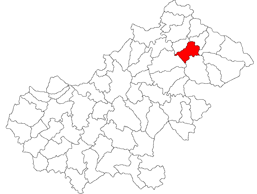 Categorie:Hărţi ale judeţului Satu Mare